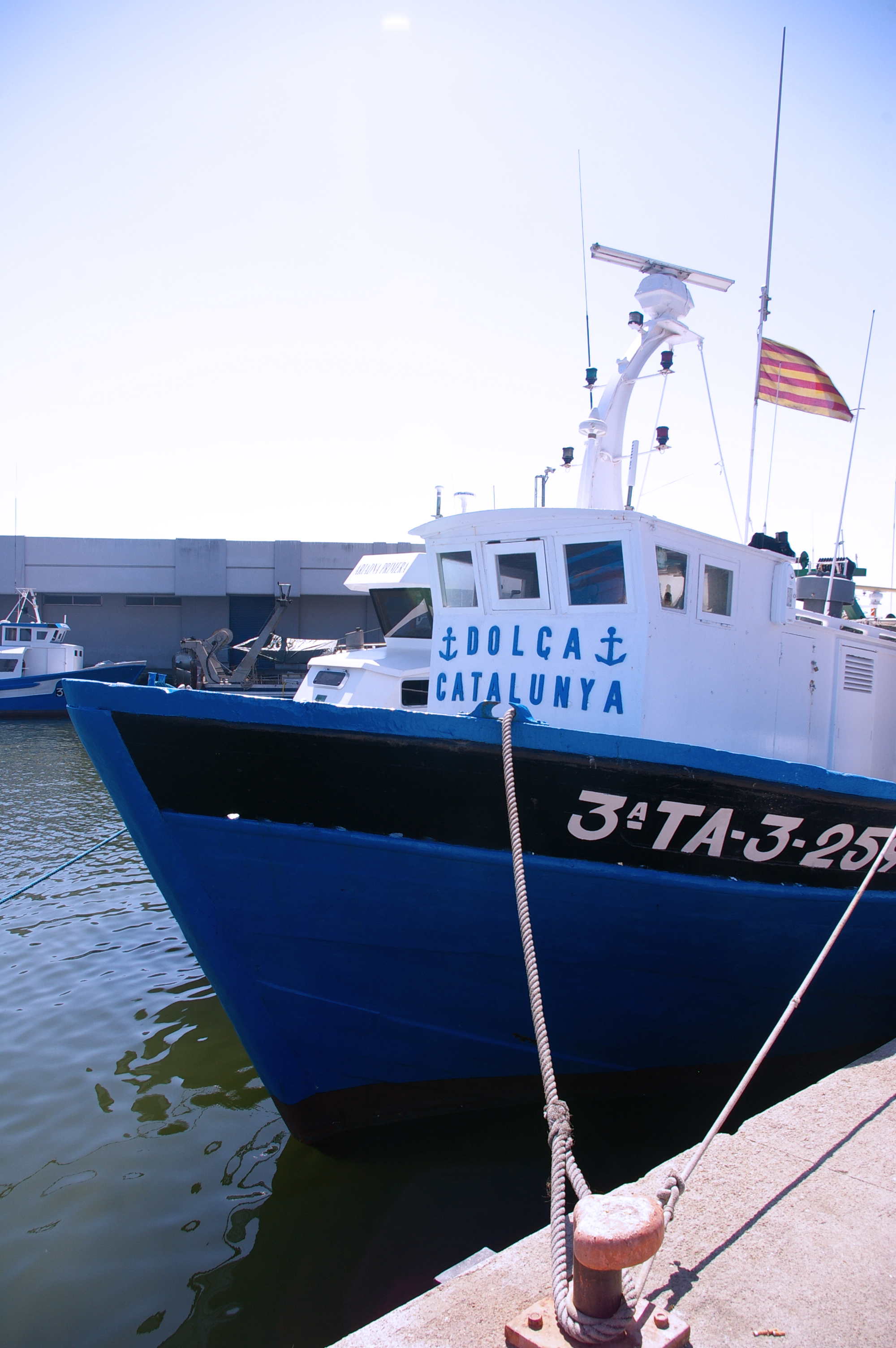 Dolça Catalunya (Port de Cambrils, Baix Camp, Catalunya)